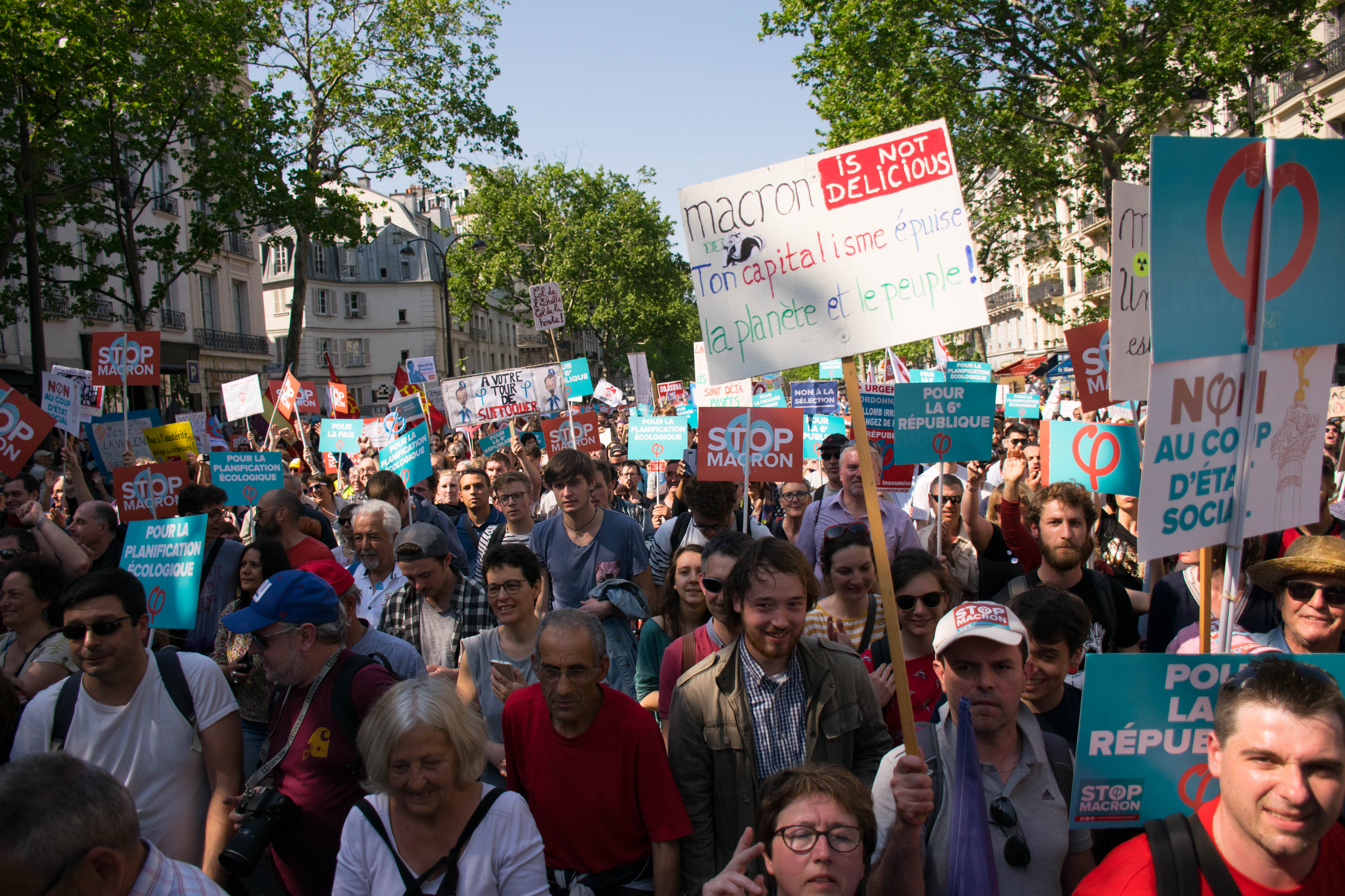 Manifestation organisée par La France insoumise (LFI) le 5 mai 2018 et intitulée « La Fête à Macron ». Parcours entre Opéra et Bastille.